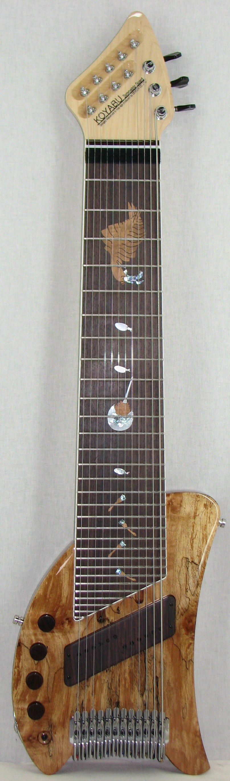 Das Koyabu Custommodell SP mit einer Decke aus gestocktem Ahorn, Mahagonikorpus und handgearbeiteten Griffbretteinlagen, den japanischen Ahnenkreaturen.